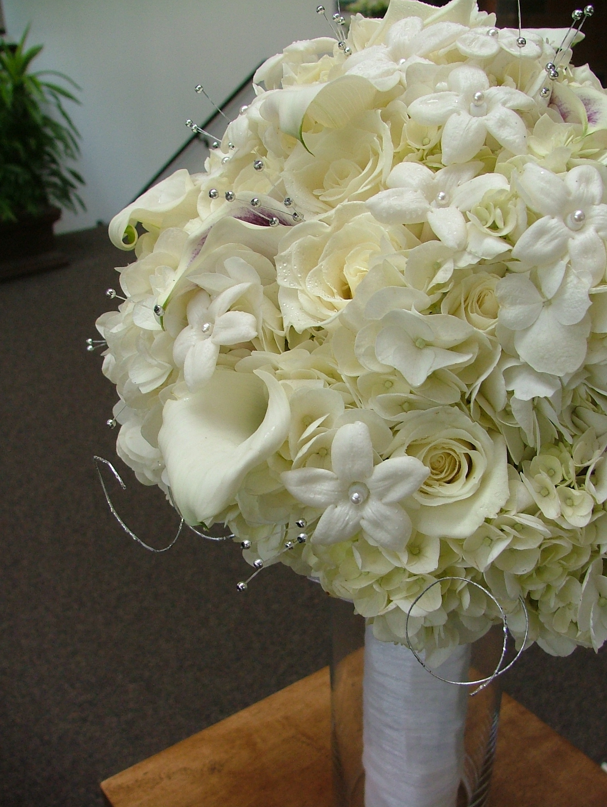 Tebrikleri için bütün Vikidostlara teşekkürler. Darısı isteyenlerin başına :) Cat msj 06:59, 3 Ağustos 2008 (UTC).